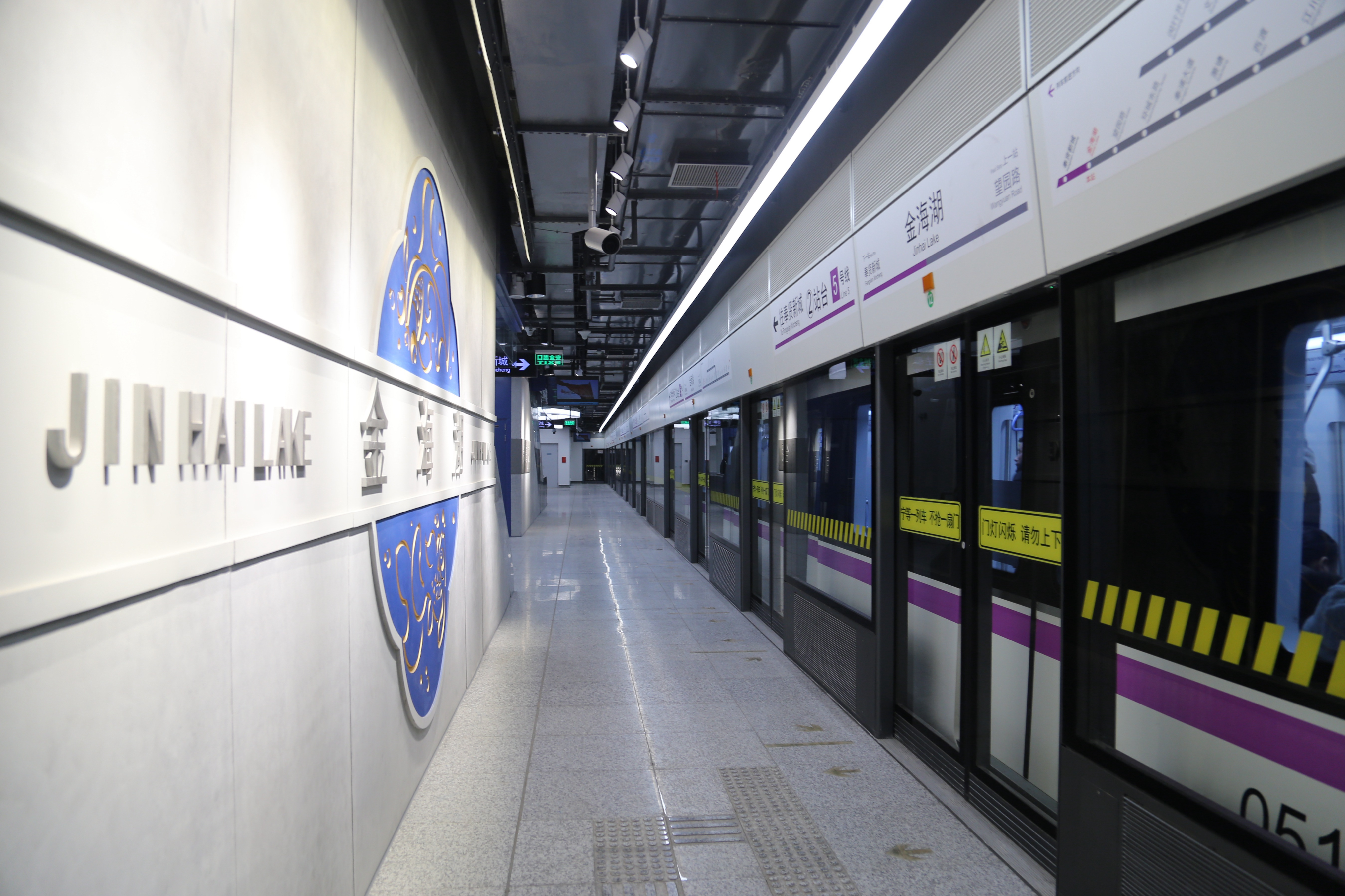 金海湖站站台